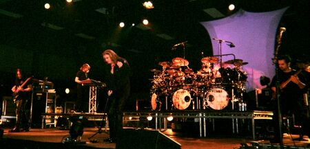 Dream Theater à Petange en 2002 origine : photo prise par mes soins lors du concert de Dream Theater le 4 novembre 2002 à Petange. Concert fabuleux soit dit en passant. Tom 18 déc 2004 à 14:19 (CET)